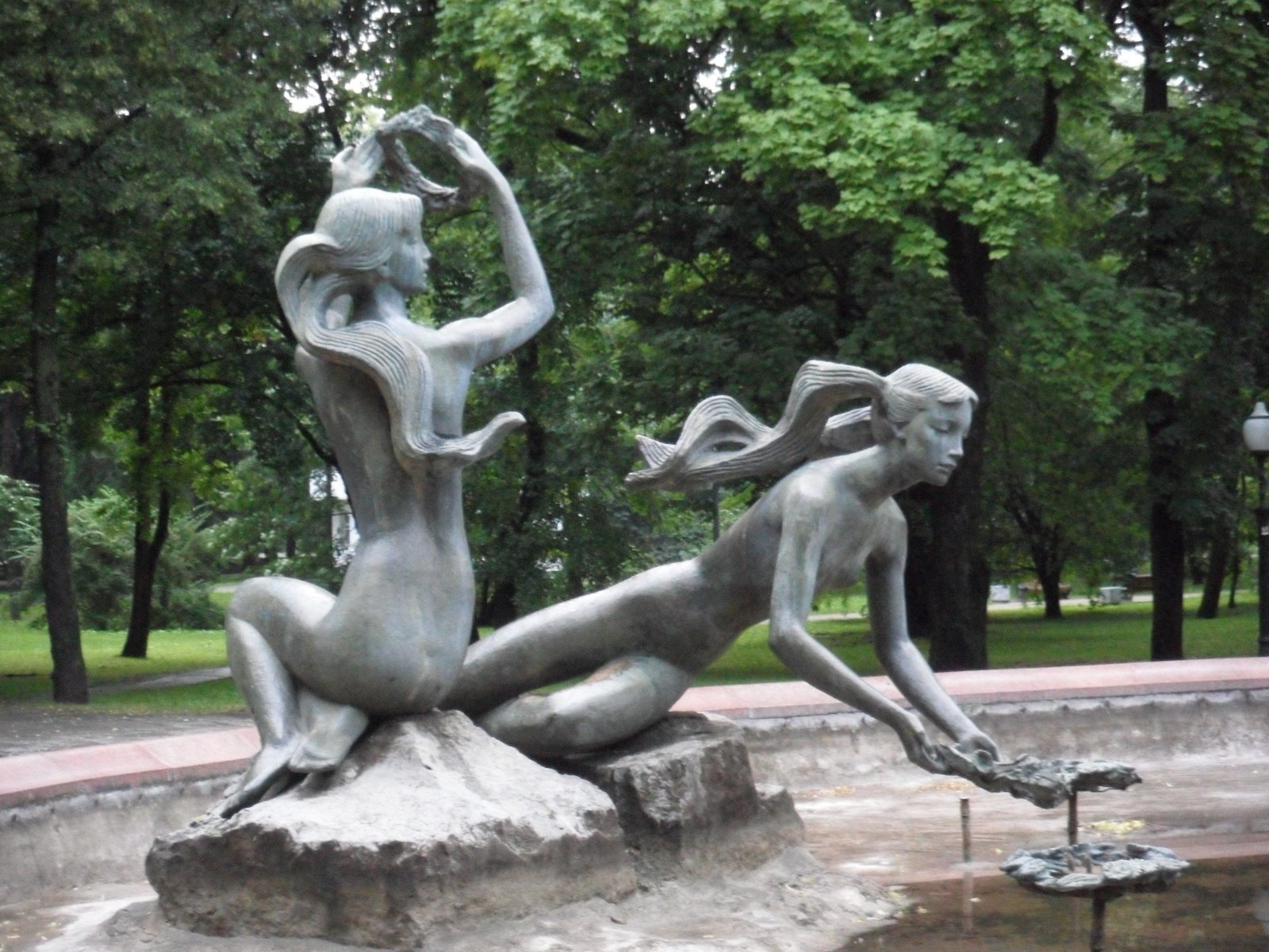 Vieladarožka, Minsk, Belarus